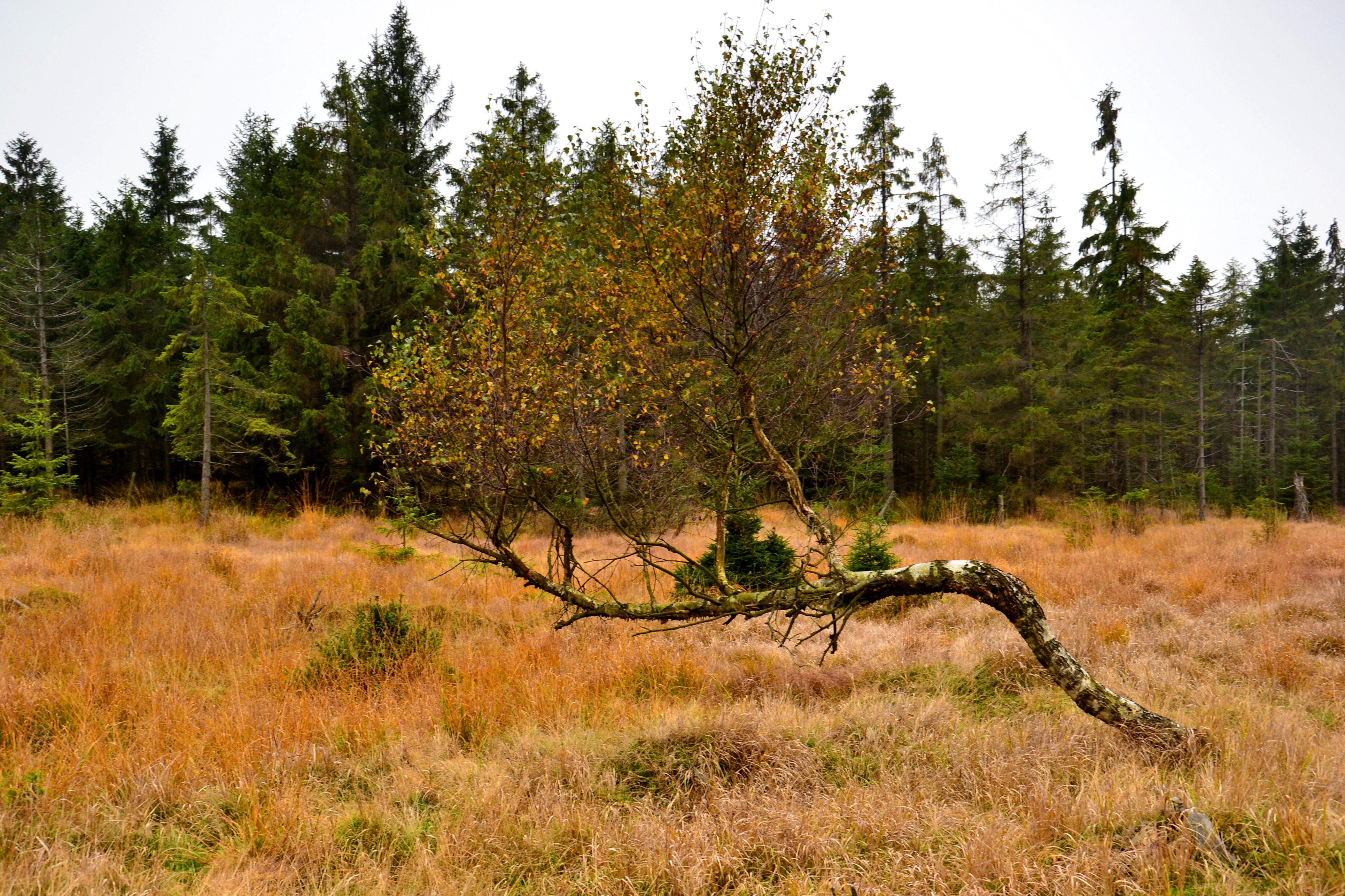 NPR Novodomské rašeliniště - bříza